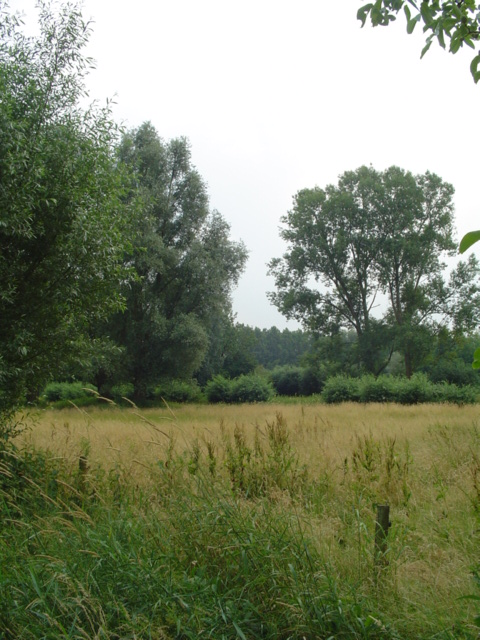 AabroekenVeghel